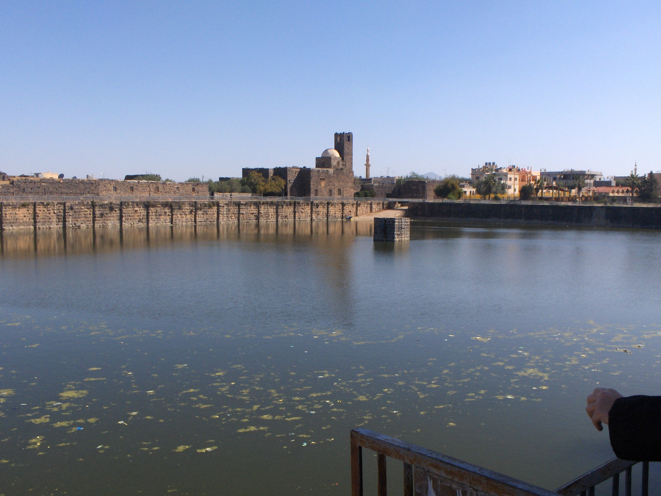 Bosra in Syrien: Wasserresevoir aus römischer Zeit Birket el Hadji ("Teich der Pilger"), im Hintergrund die um das Jahr 1225 errichtete Abu al Feda Moschee.